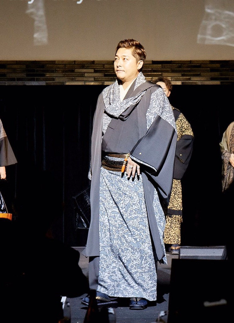 人見塁（ファッションショー出演時）